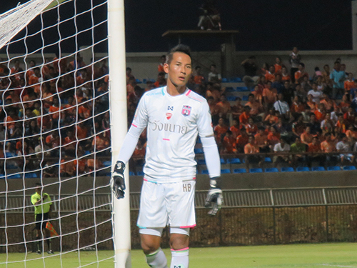 Pisan Dorkmaikaew